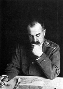 Каледин Алексей Максимович , Новочеркасск 1918г.